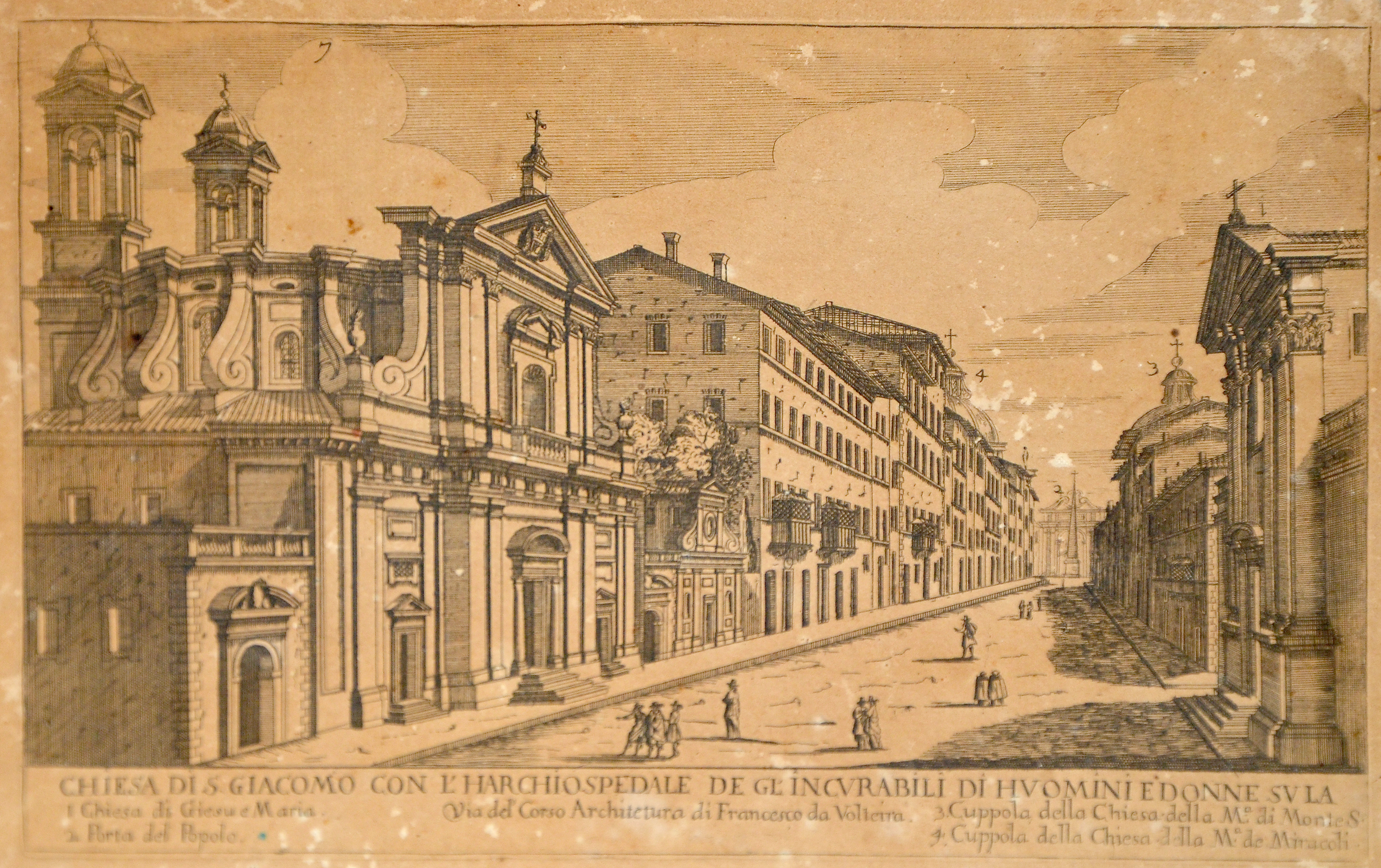 Chiesa di s. giacomo con l'harchiospedale de glincvrabili di homini donne SV LA Via del Corso Achitectura di Francesco da Volterra. 1. Chiesa di Gesue Maria 2. Porta del Popolo 3. Cuppola della Chiesa della M. di Monte S. 4. Cuppola della Chiesa della M. de Miraccoli Location of the picture: Jardins d’Alfàbia